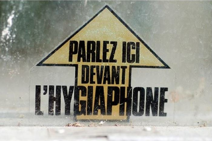 Passe-sons